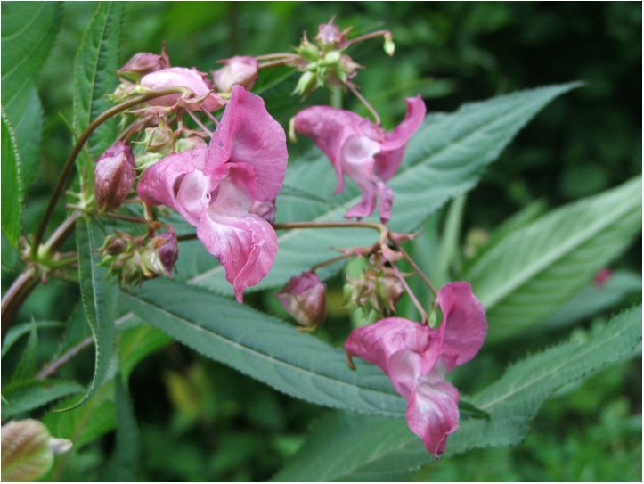 Impatiens glandulifera (Bíbor nebáncsvirág)